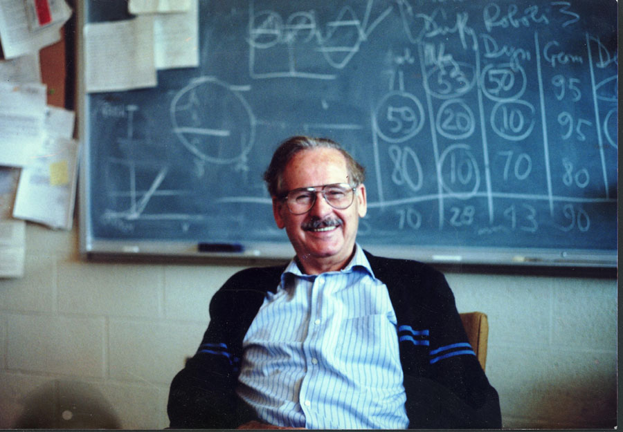 Jiří Tlustý přednáší na University of Florida